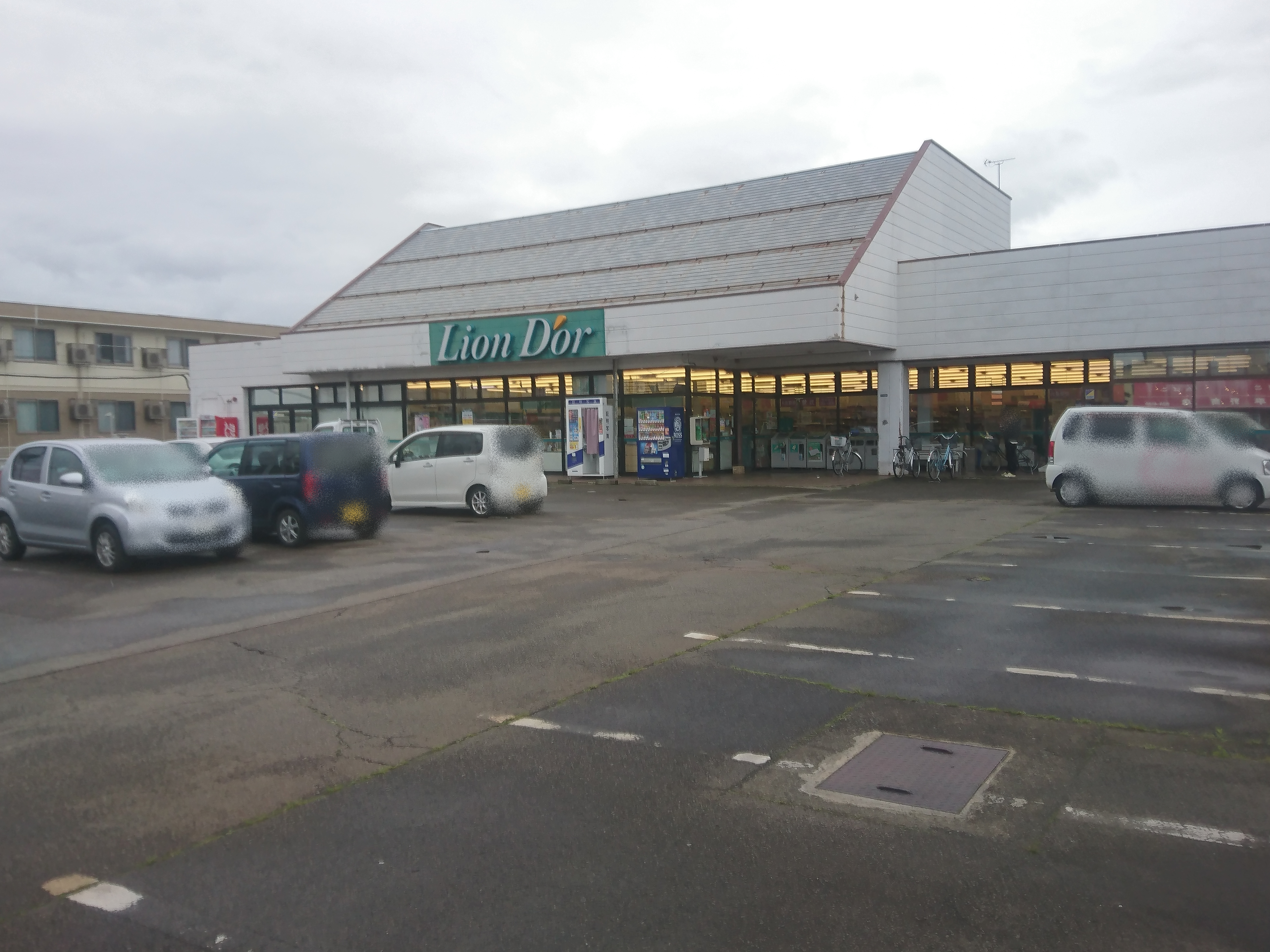 リオン・ドール七日町店外観（2018年5月9日撮影）